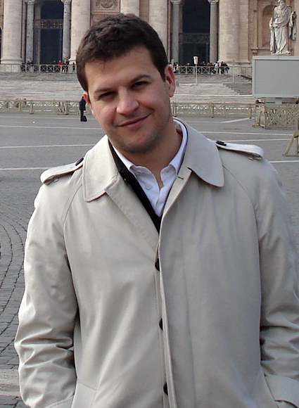 Guillaume Musso, hiver 2010